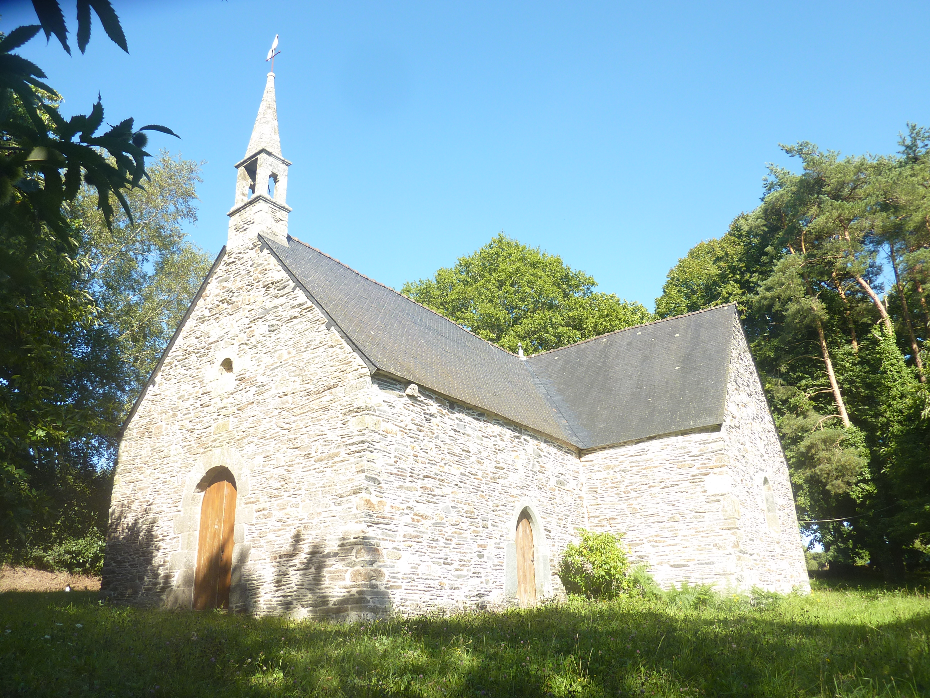 Caurel : la chapelle Saint-Golven où se déroulait le pardon des carriers